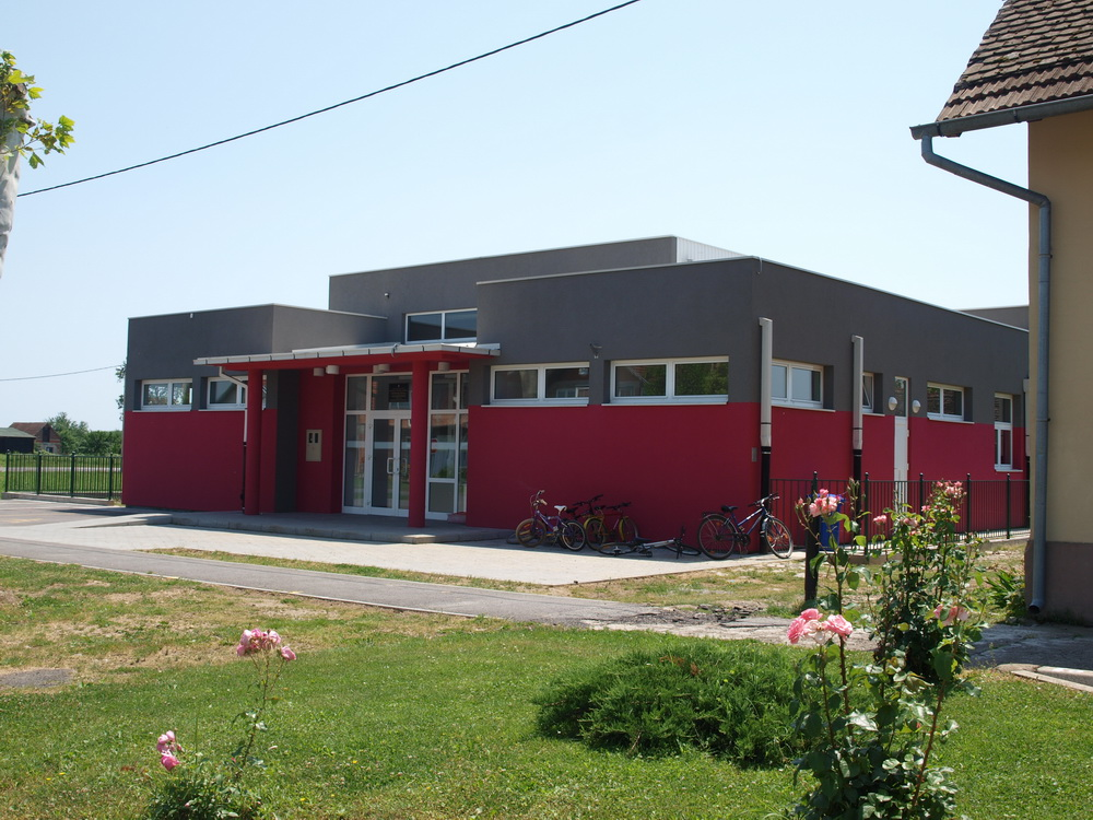 Osnovna škola u selu Čajkovci, Brodsko-posavska županija.